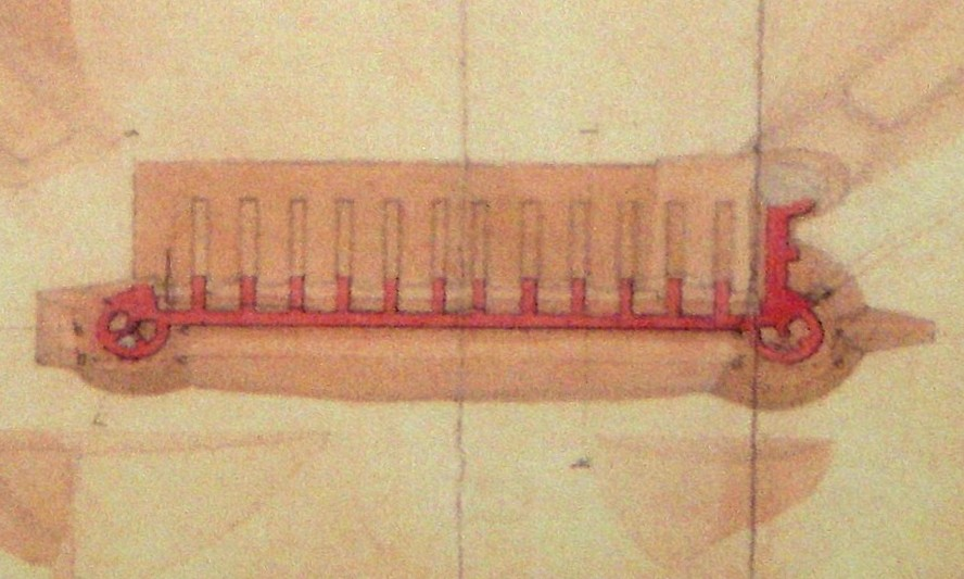 Johanneshovs skans, Stockholm, slutvärnet, "Relationsritning öfwer Stockholms besfästningsbyggnad, södra sidan, Werket No XI". Detalj av slutvärnet.